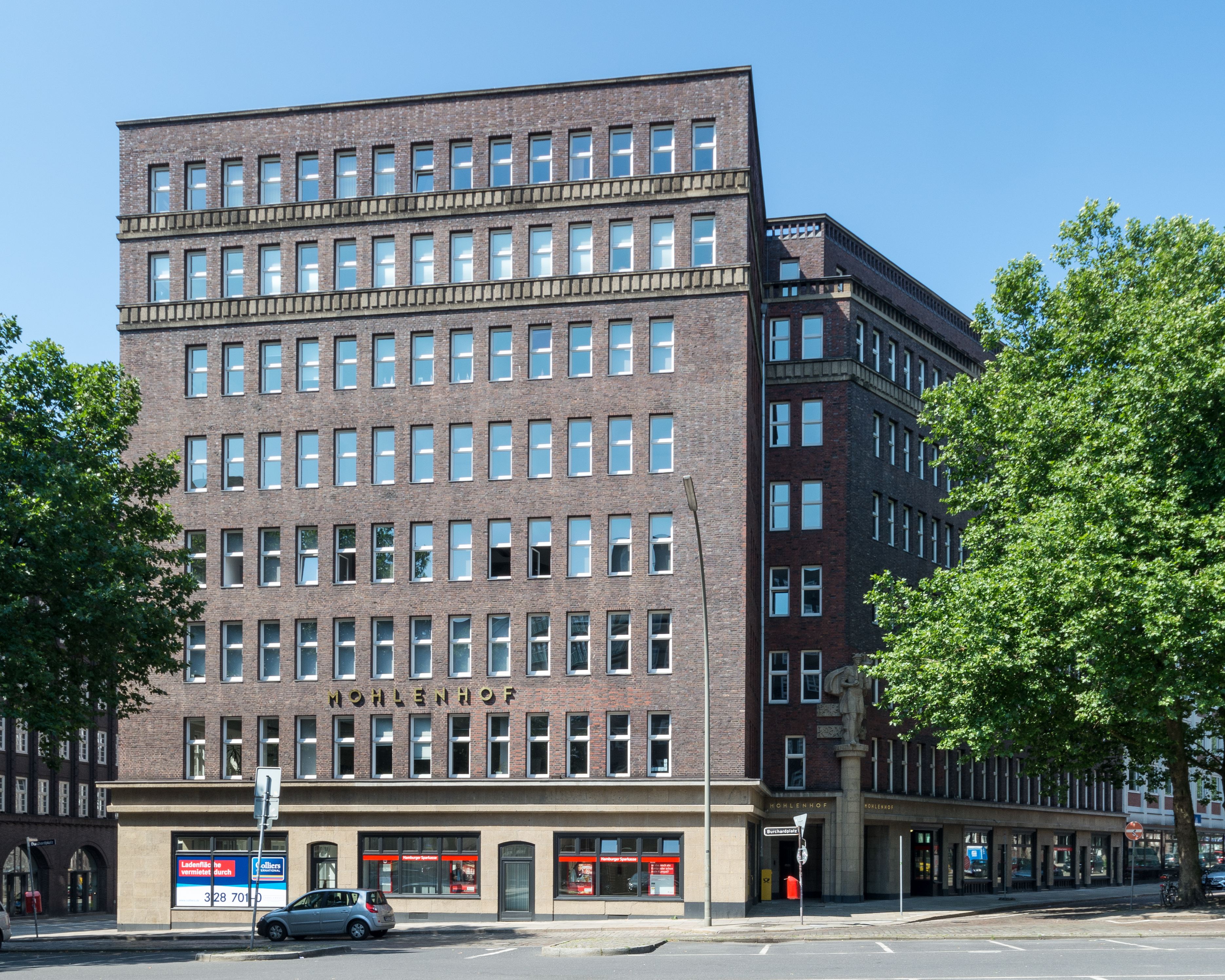 Kontorhaus Mohlenhof in Hamburg-Altstadt. This is a photograph of an architectural monument.